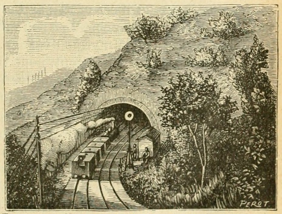 Le tour de la France par deux enfants, par George Bruno, manuel scolaire, édition de 1904, page 181.